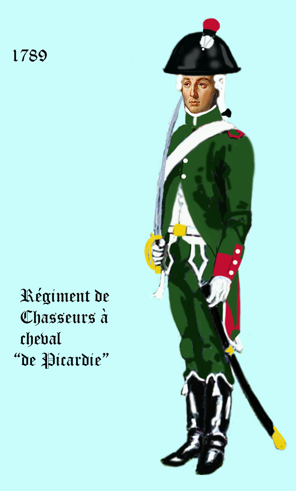 l'uniforme du régiment Chasseurs à cheval "de Picardie" de 1789